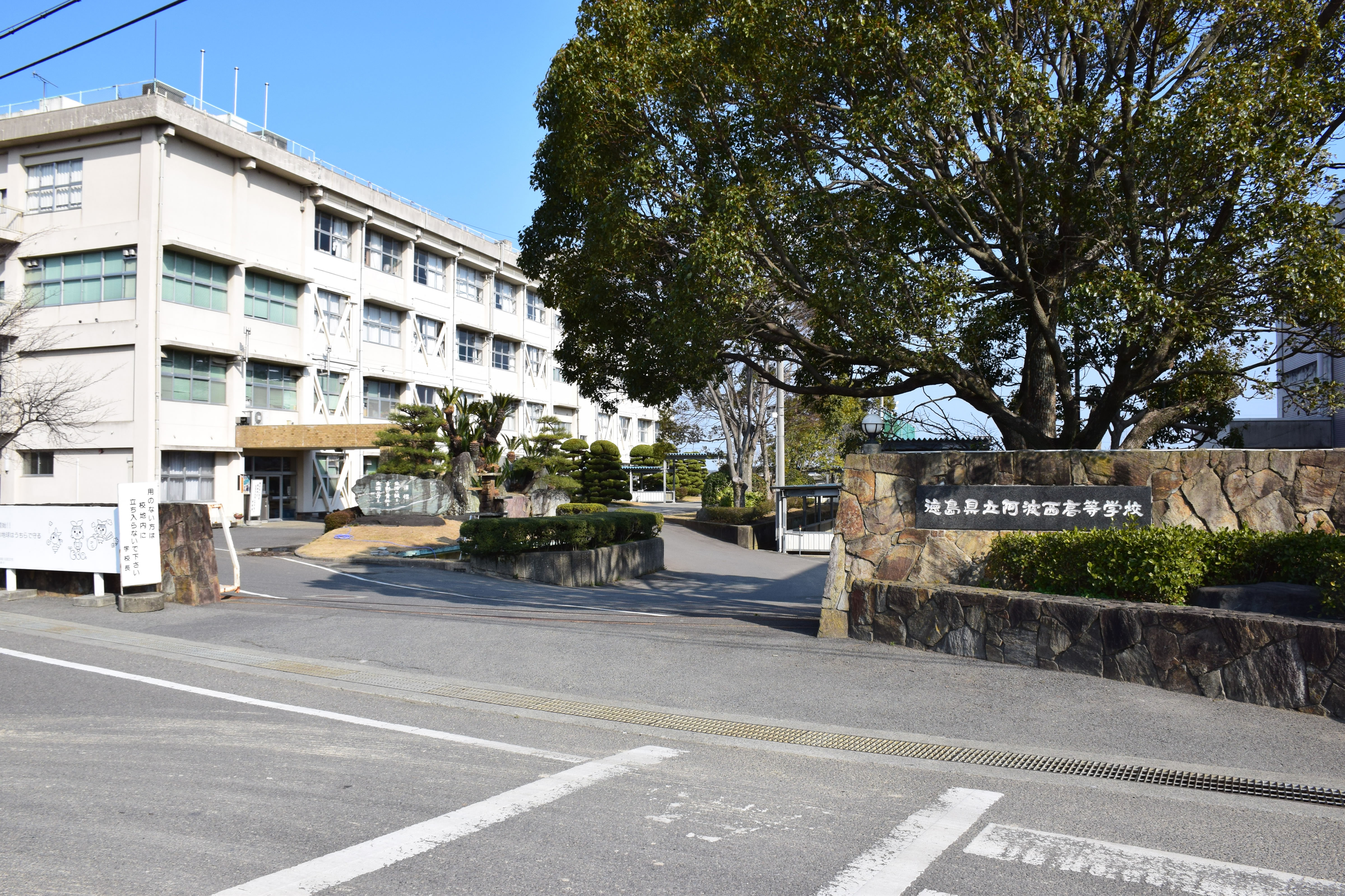 徳島県立阿波西高等学校